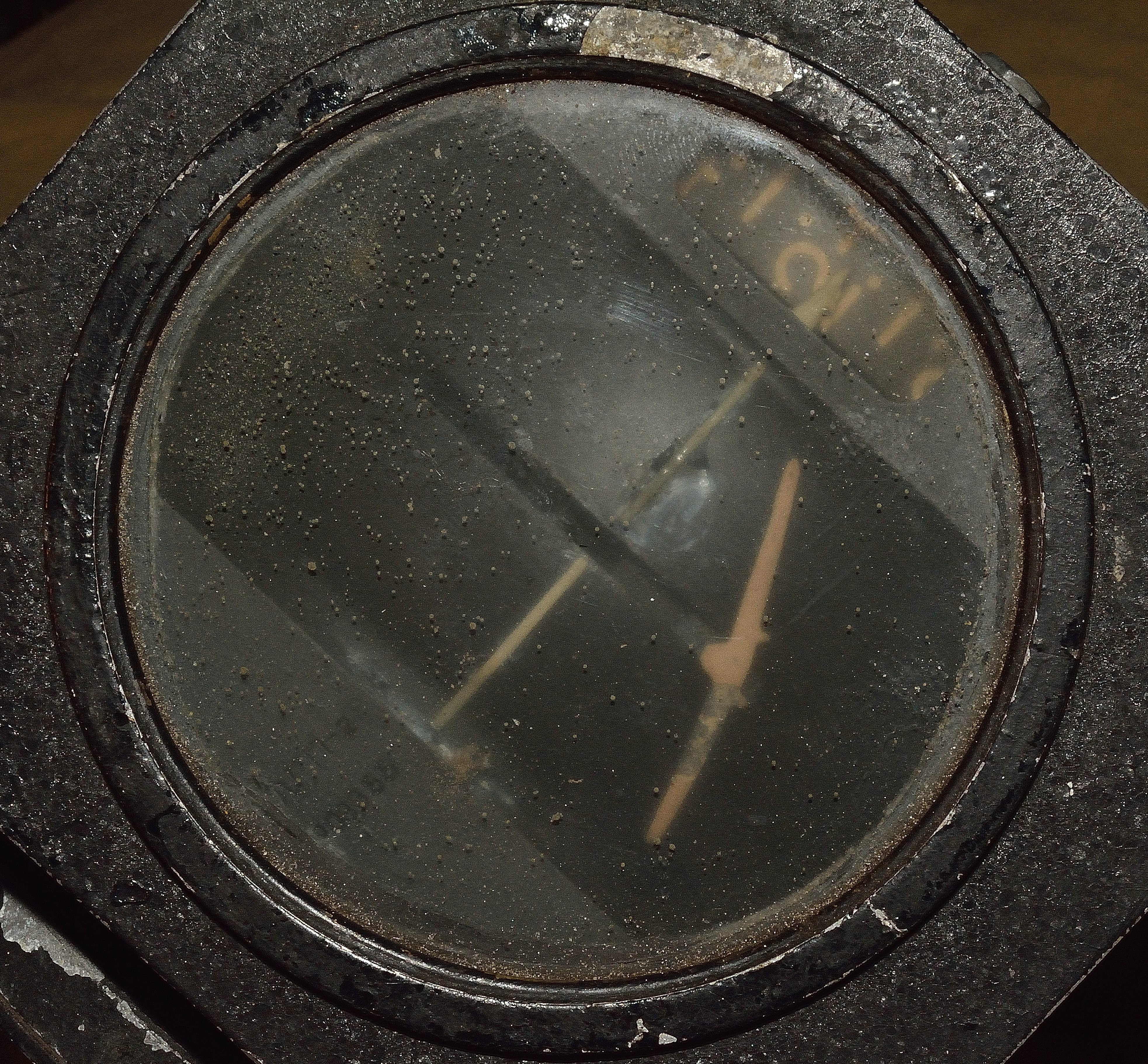 Radziecki sztuczny horyzont AGP-2 - pokaz działania